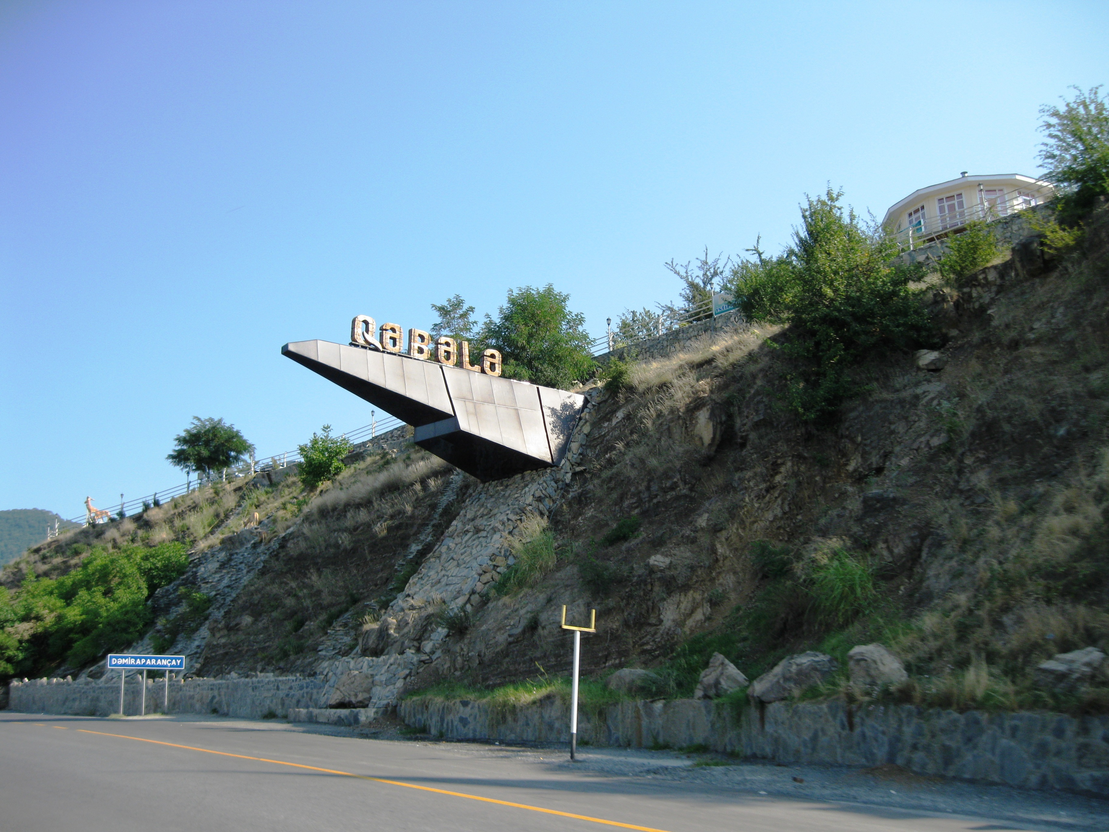 Габалинский район Азербайджана.